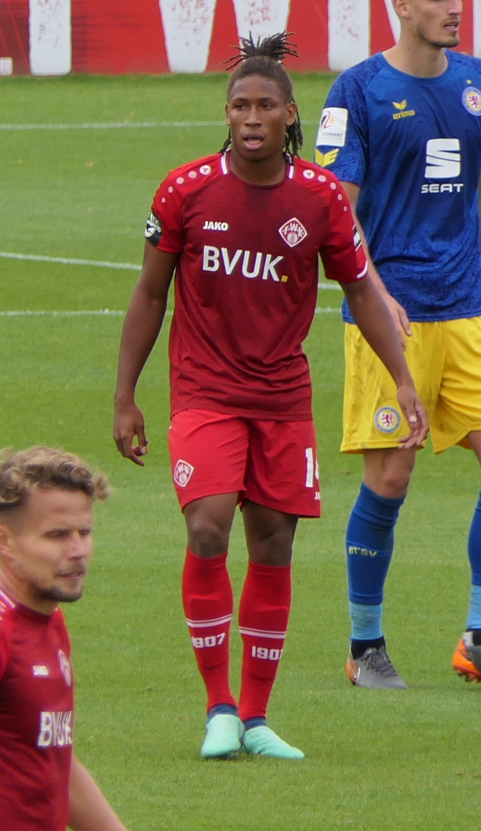 Der Fussballprofi Caniggia Elva im Trikot der Würzburger Kickers beim Heimspiel gegen Eintracht Braunschweig am 22.09.2018.